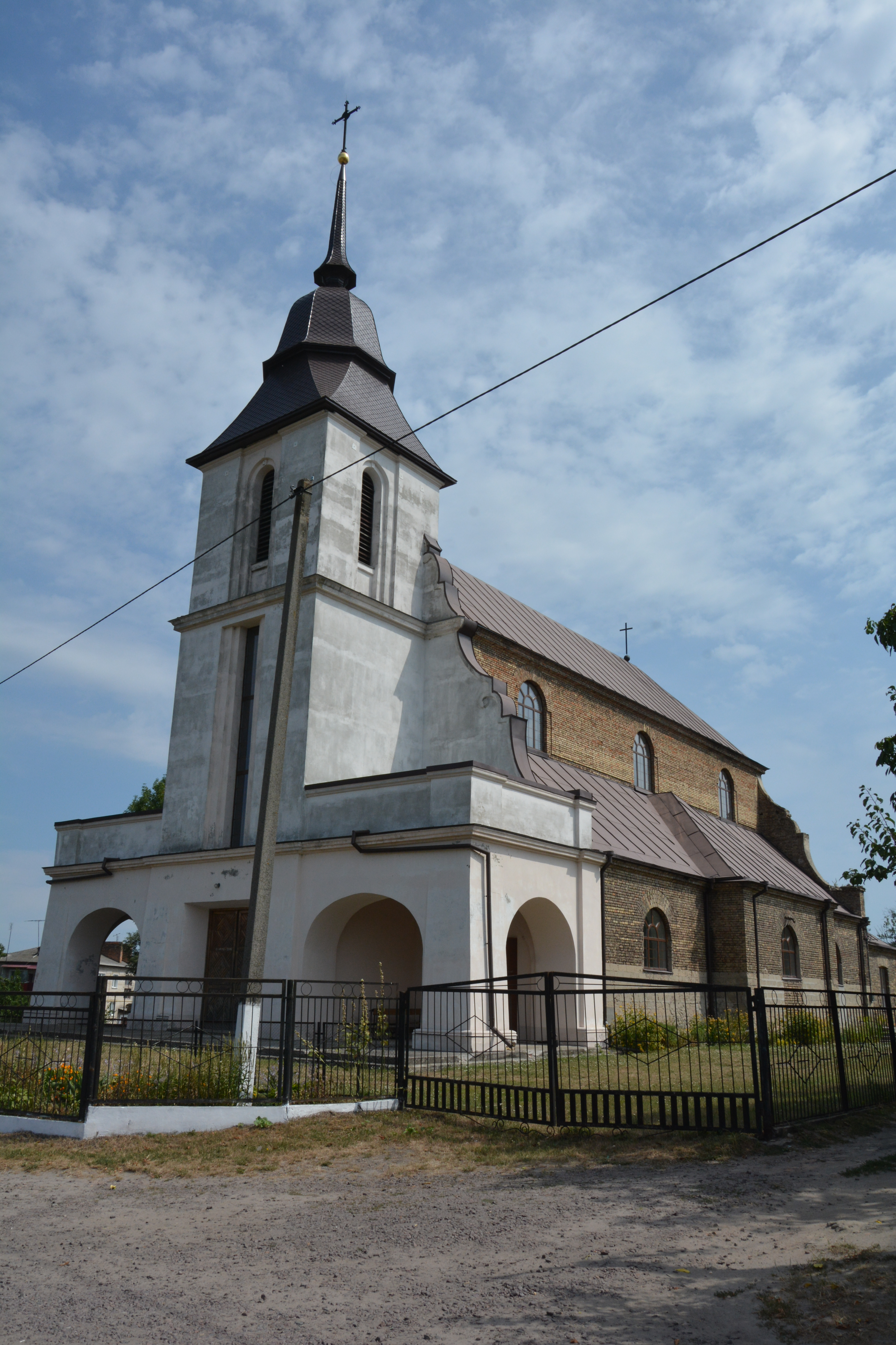 Костел (мур.), Рожище